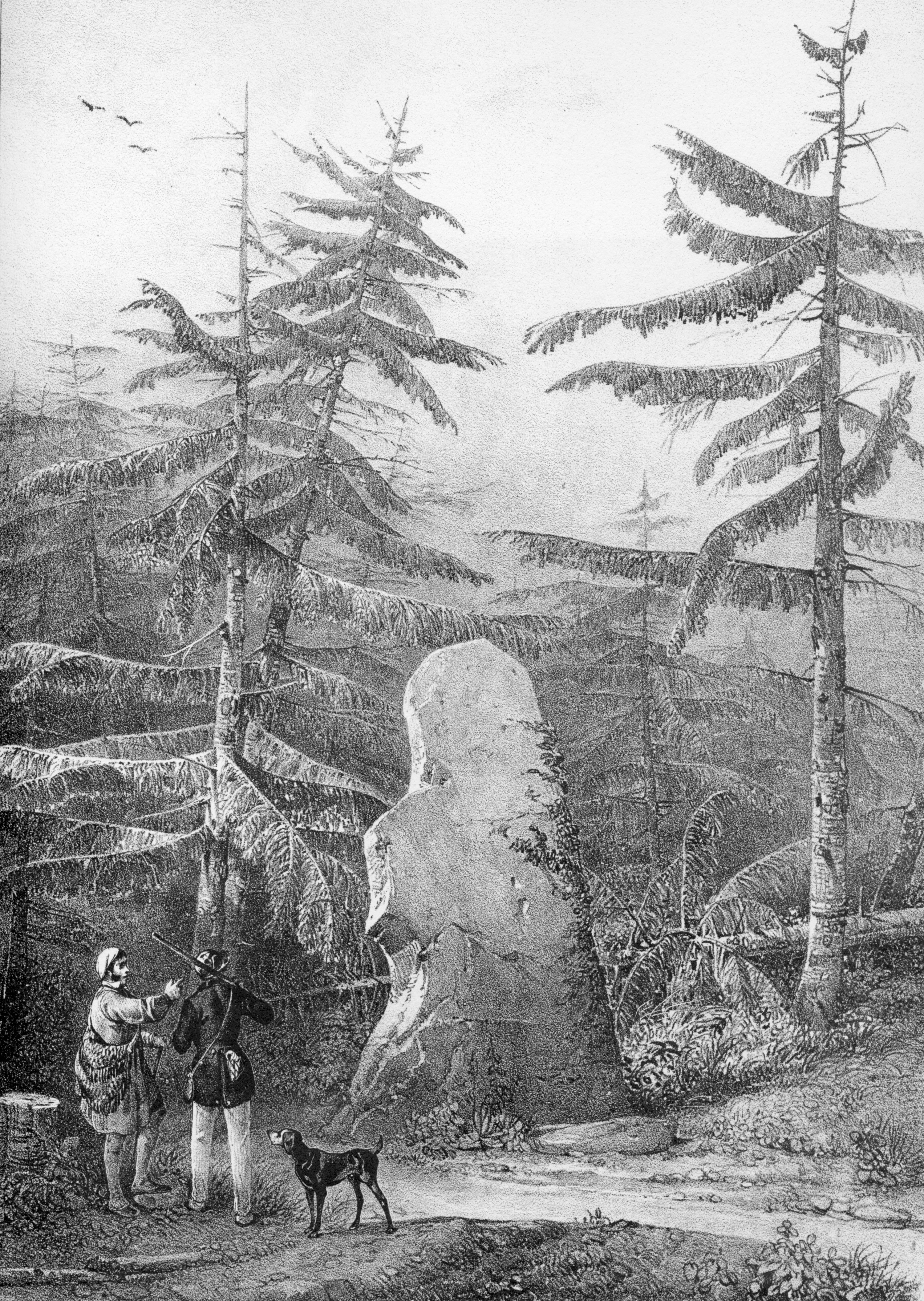 Pierre Lite à coté de Nozeroy